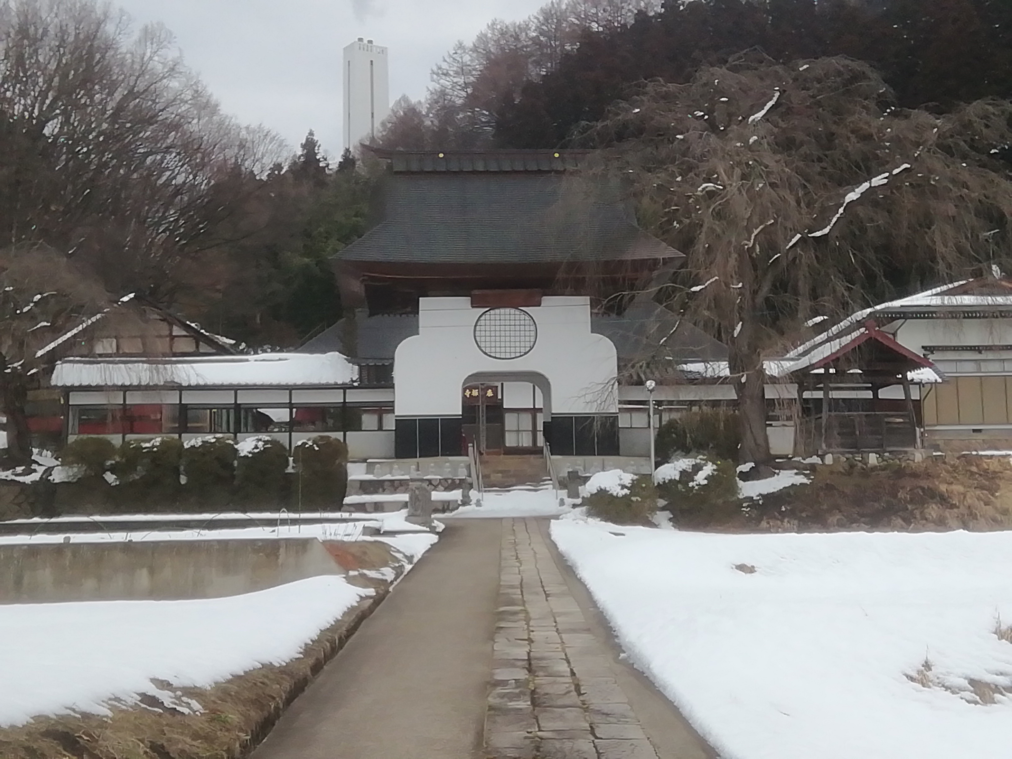 泰清寺(2020-2-12)